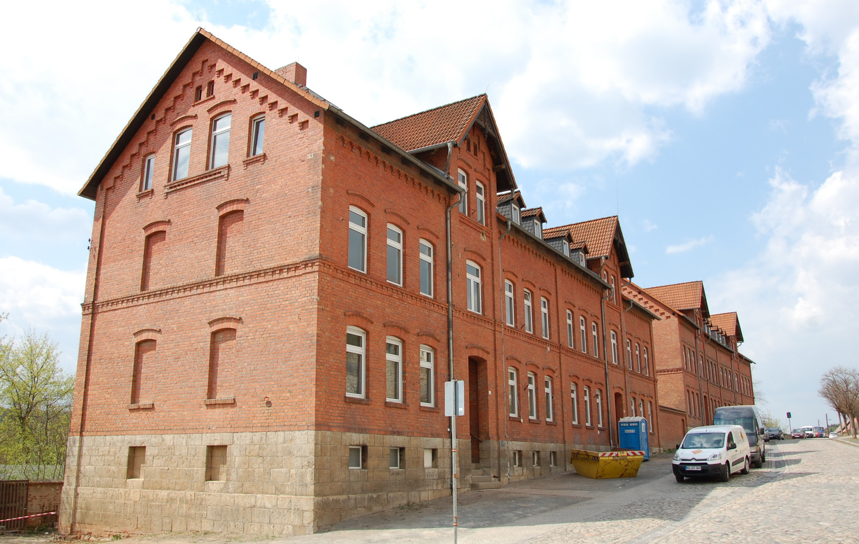 Haus Langenbergstraße 37 in Quedlinburg